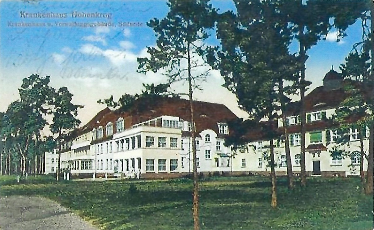 Postkarte mit dem Krankenhaus Hohenkrug bei Stettin